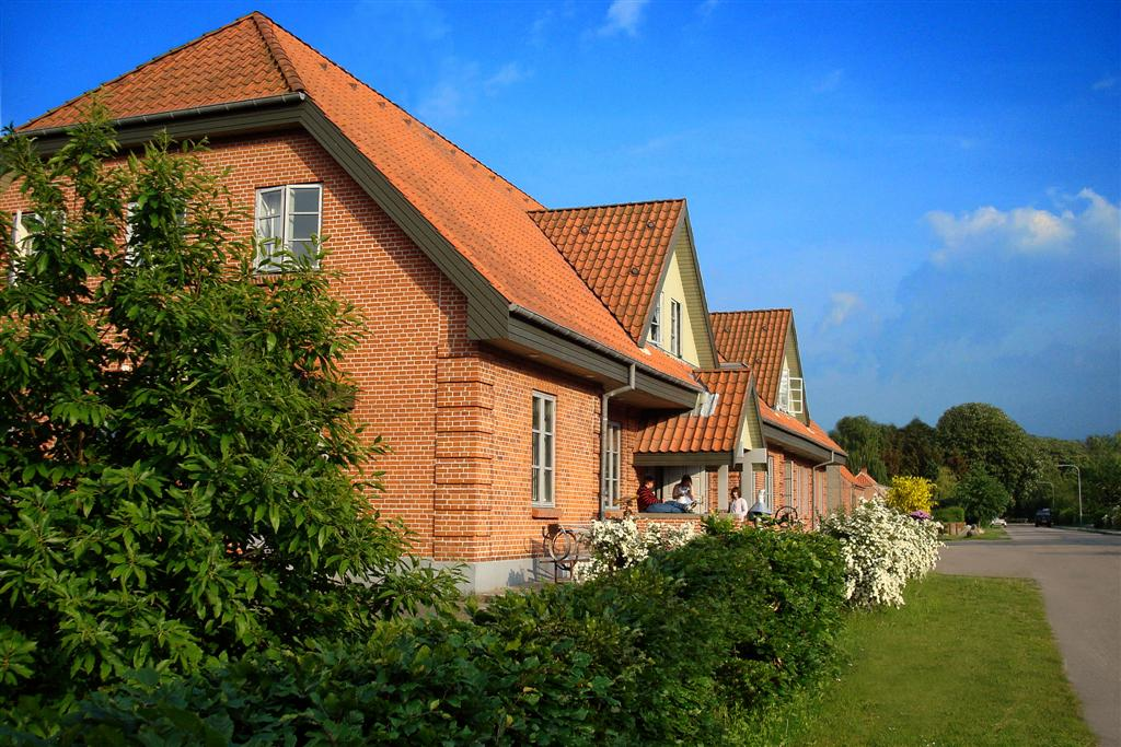 Hovedbygningen på Efterskolen Helle.